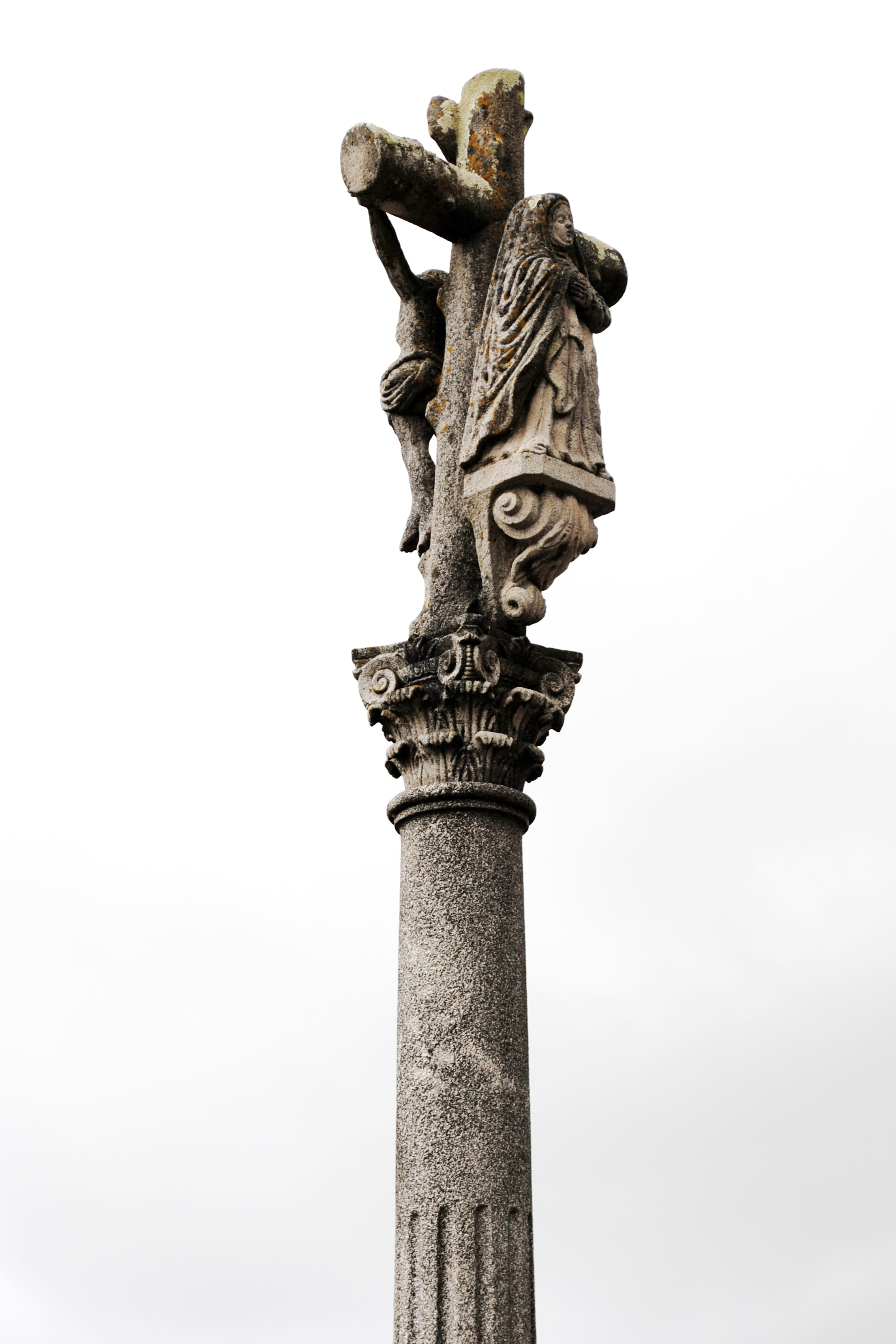 A Guarda, S. Lourenzo de Salcidos, cruceiro.